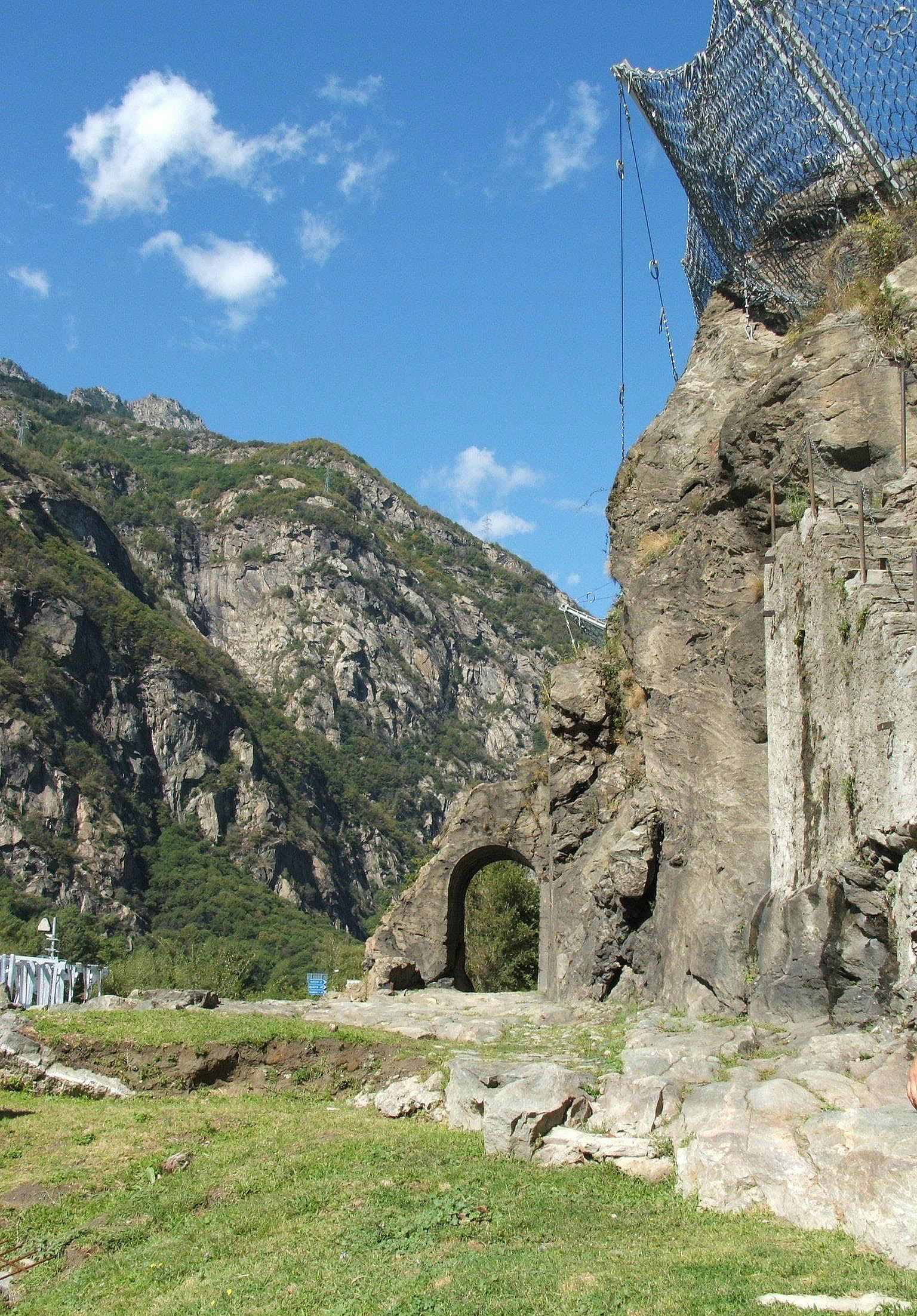 Valle d'Aosta, Donnas, Antica strada romana